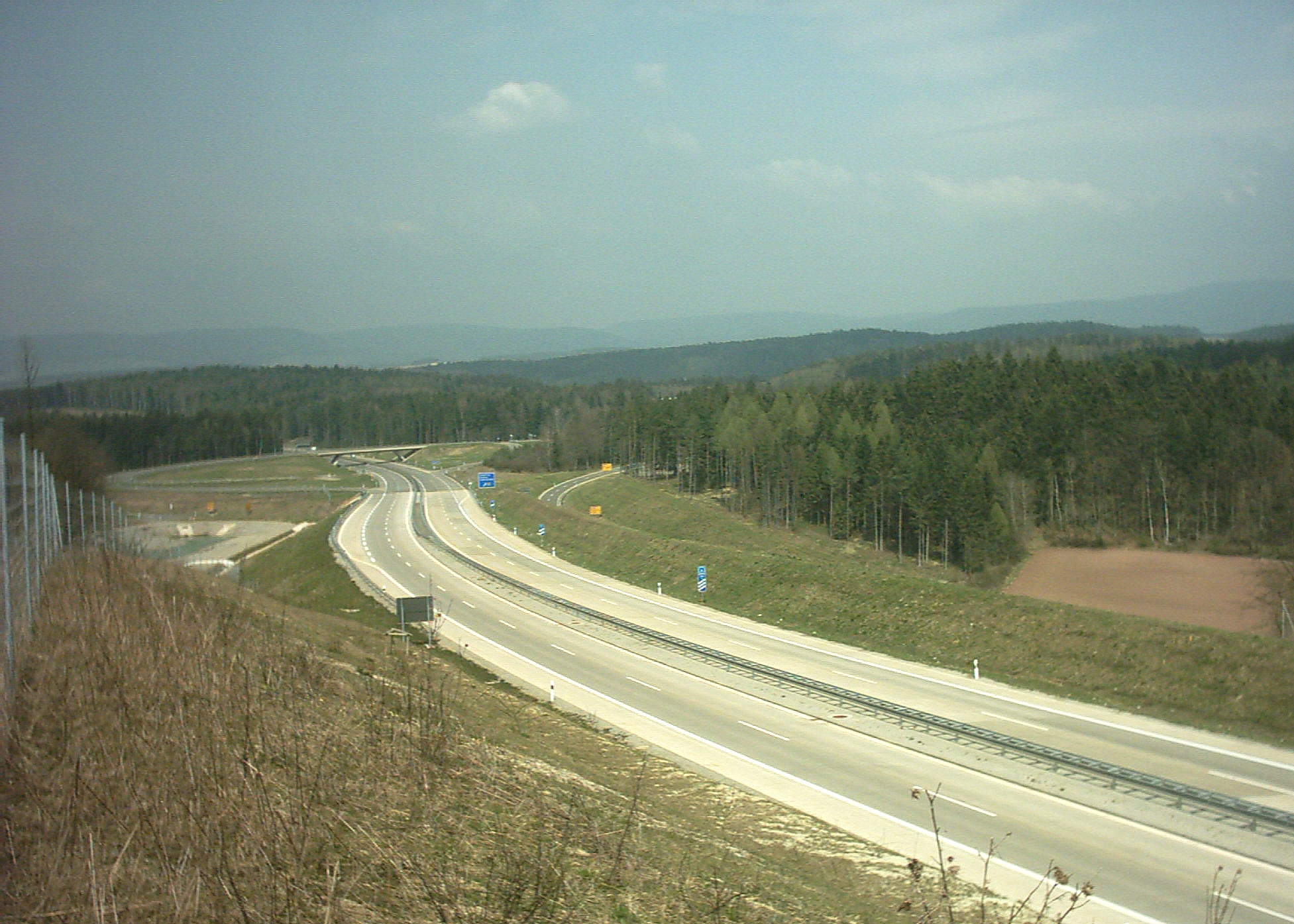 A73 Grenze Thüringen/Bayern - Der Wechsel in der Färbung des Fahrbahnbelags markiert den Übergang von Thüringen (Hintergrund) mit Asphaltbelag nach Bayern (Vordergrund) mit Betonbelag.